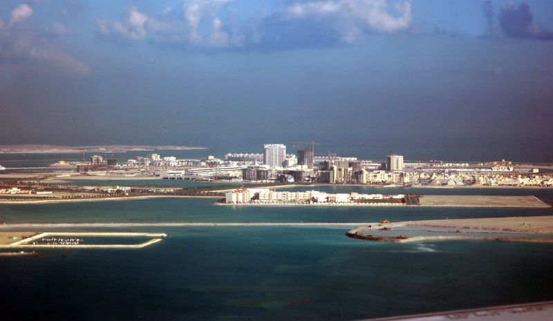 ബഹ്‌റൈൻ - ഒരു വിഹഗ വീക്ഷണം